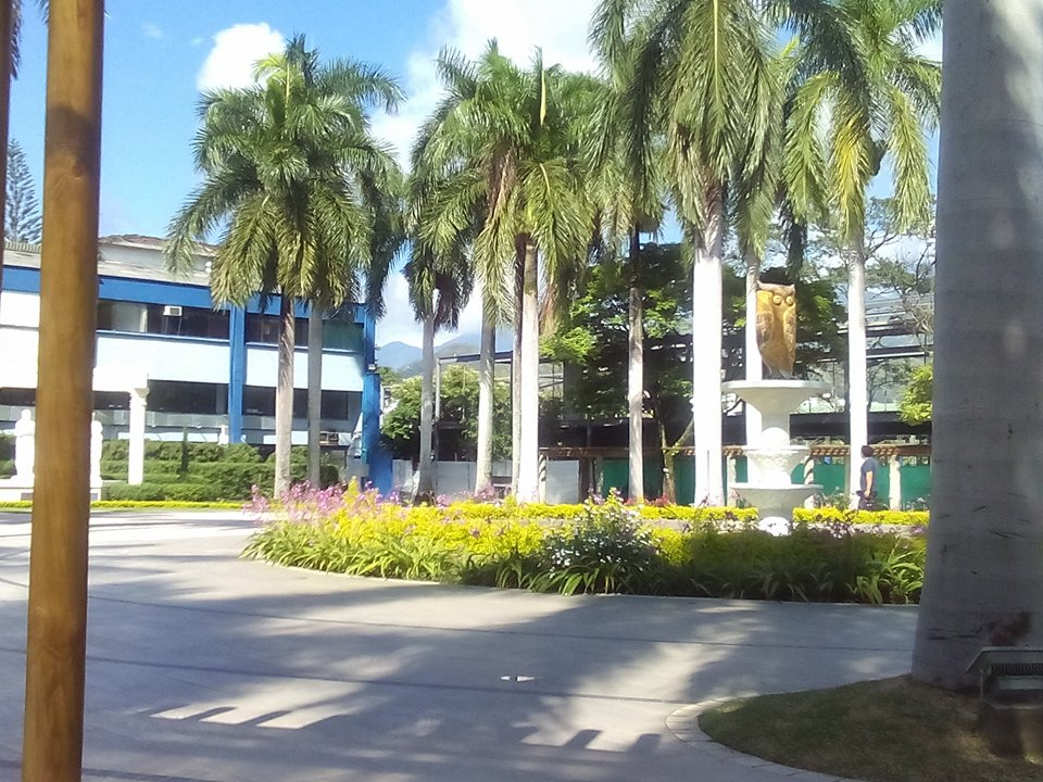 La fuente del símbolo de la Universidad Santiago de Cali, el búho, en la Plazoleta de los Sabios.